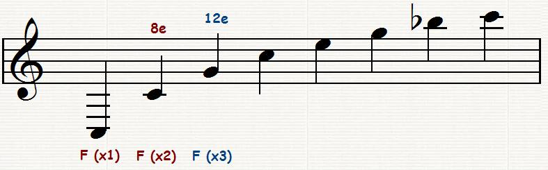 suites d'harmoniques naturelles. Copie d'écran.